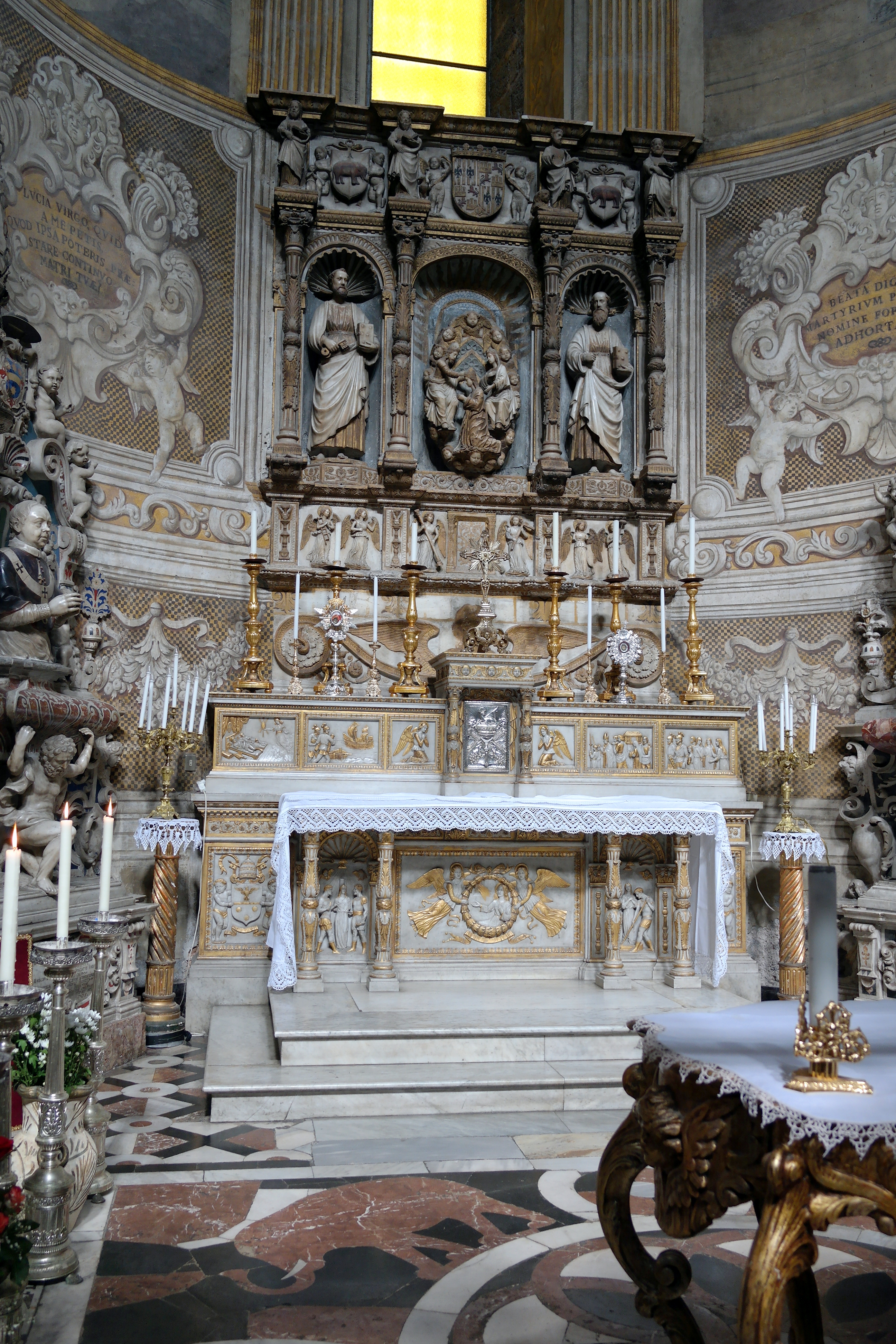 Cappella di Sant'Agata nella Cattedrale di Sant'Agata a Catania